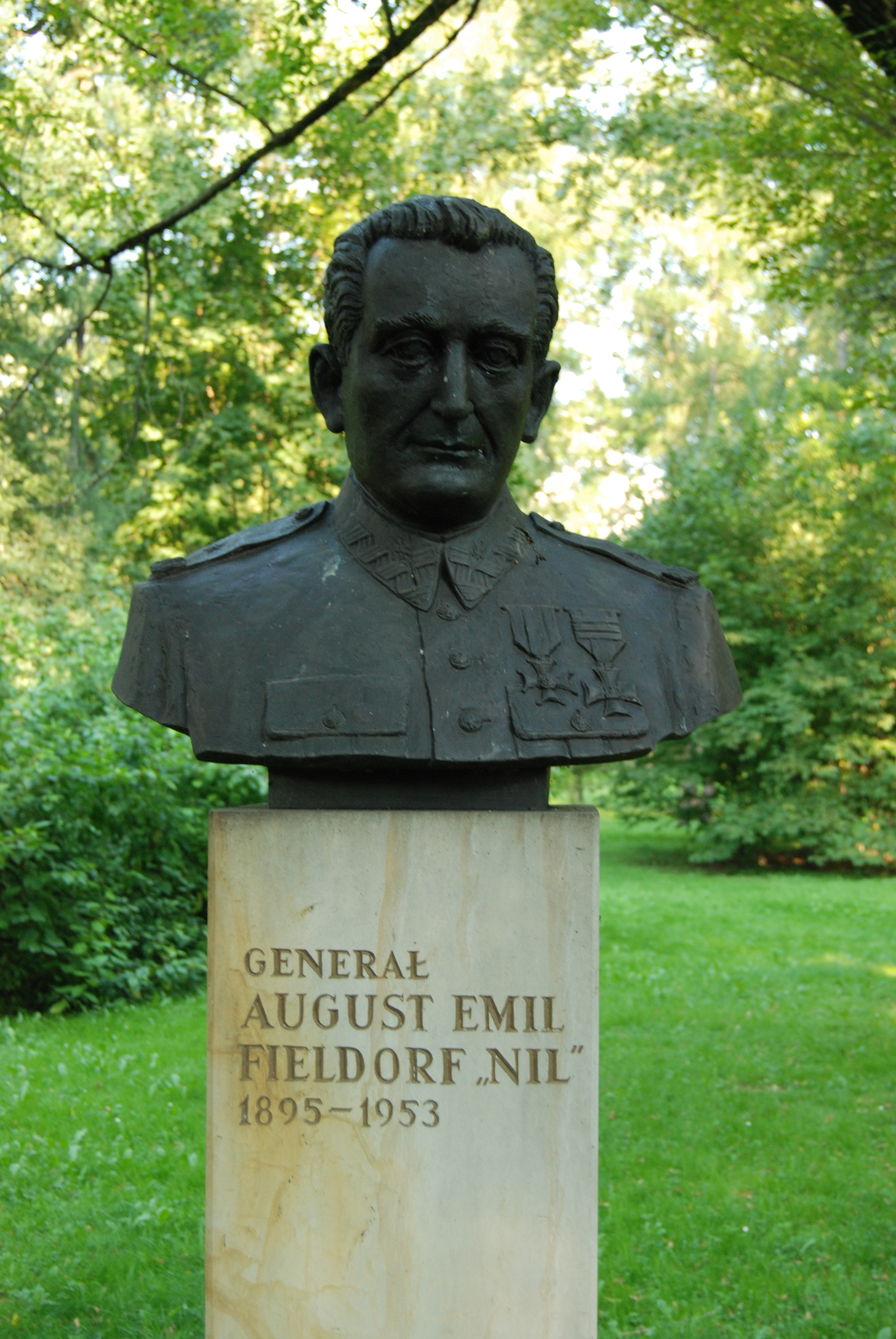 Pomnik gen. Augusta Emila Fieldorfa "Nila" w Parku Jordana w Krakowie.